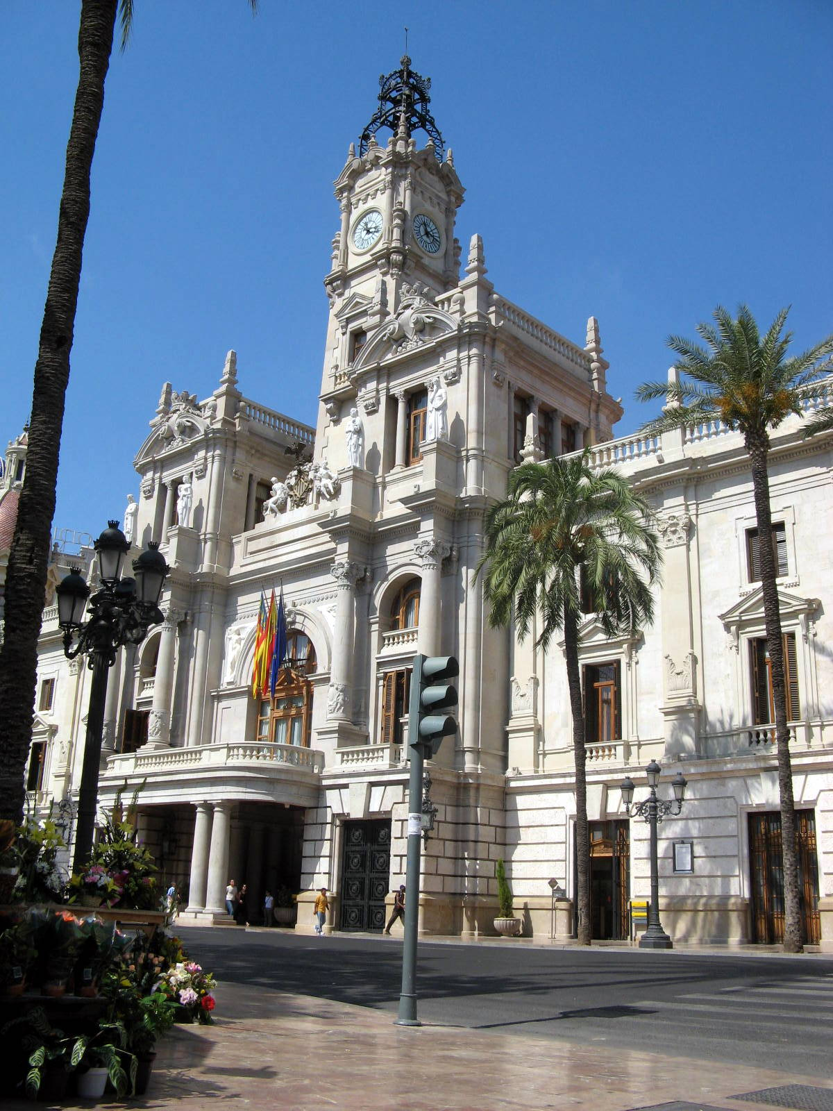 Ayuntamiento de Valencia, en Valencia (España).